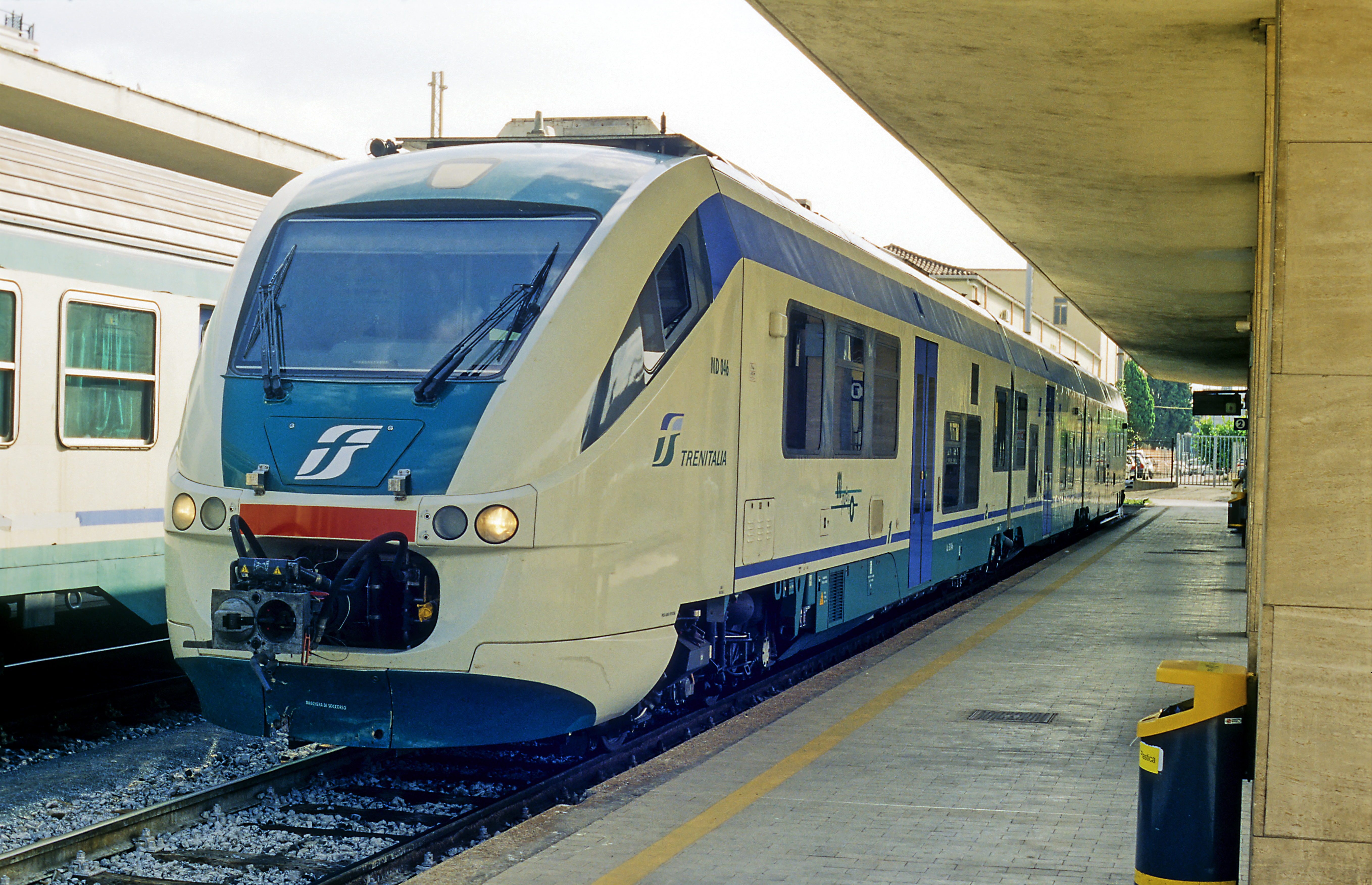 Regionalverkehrstriebwagen auf dem Bahnsteiggleis 2. Die Einstiege liegen, den italienischen Verhältnissen angepasst, besonders tief.